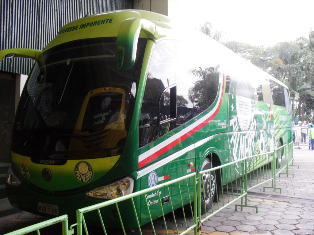 Ônibus do Palmeiras